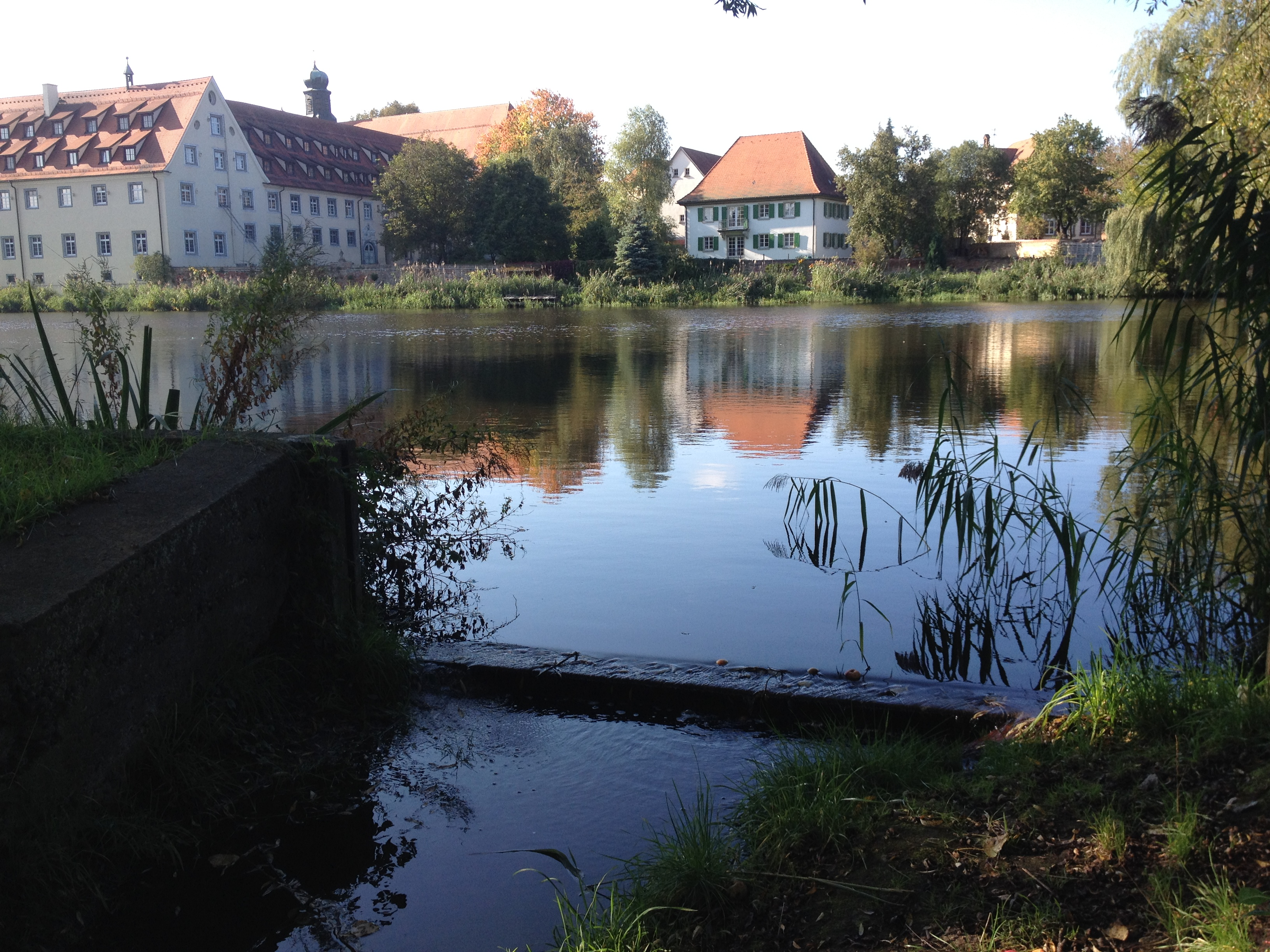 Der Klosterweiher in Wald, vorne der Überlauf des Burraubachs am Südostufer. Zentral ist das Pfarrhaus zu sehen, links Teile des Klostergebäudes.